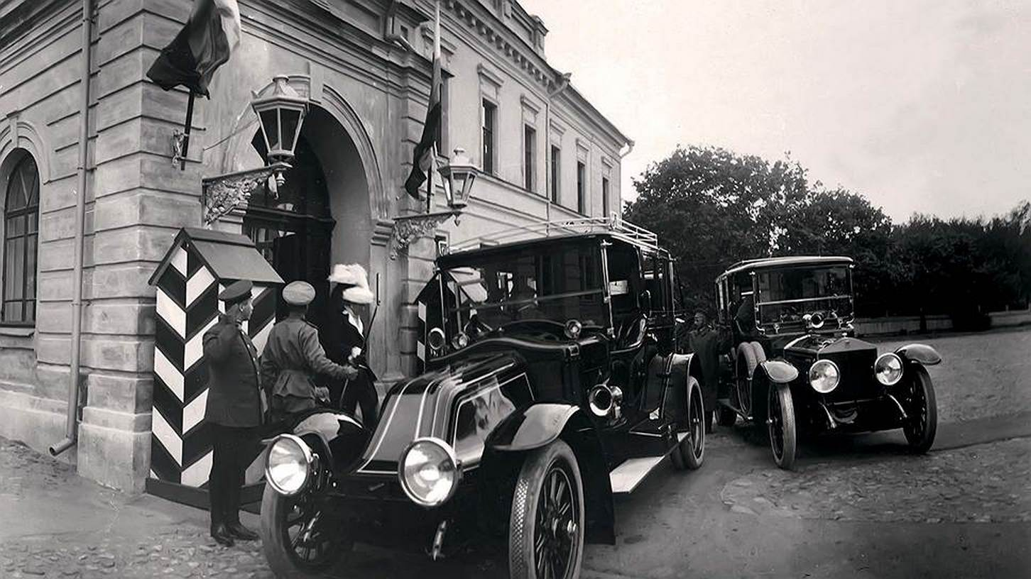 Беларуская (тарашкевіца): Магілёў (Mahiloŭ), пляц Рынак (plac Rynak). Палац і Сад Дэмбавецкага